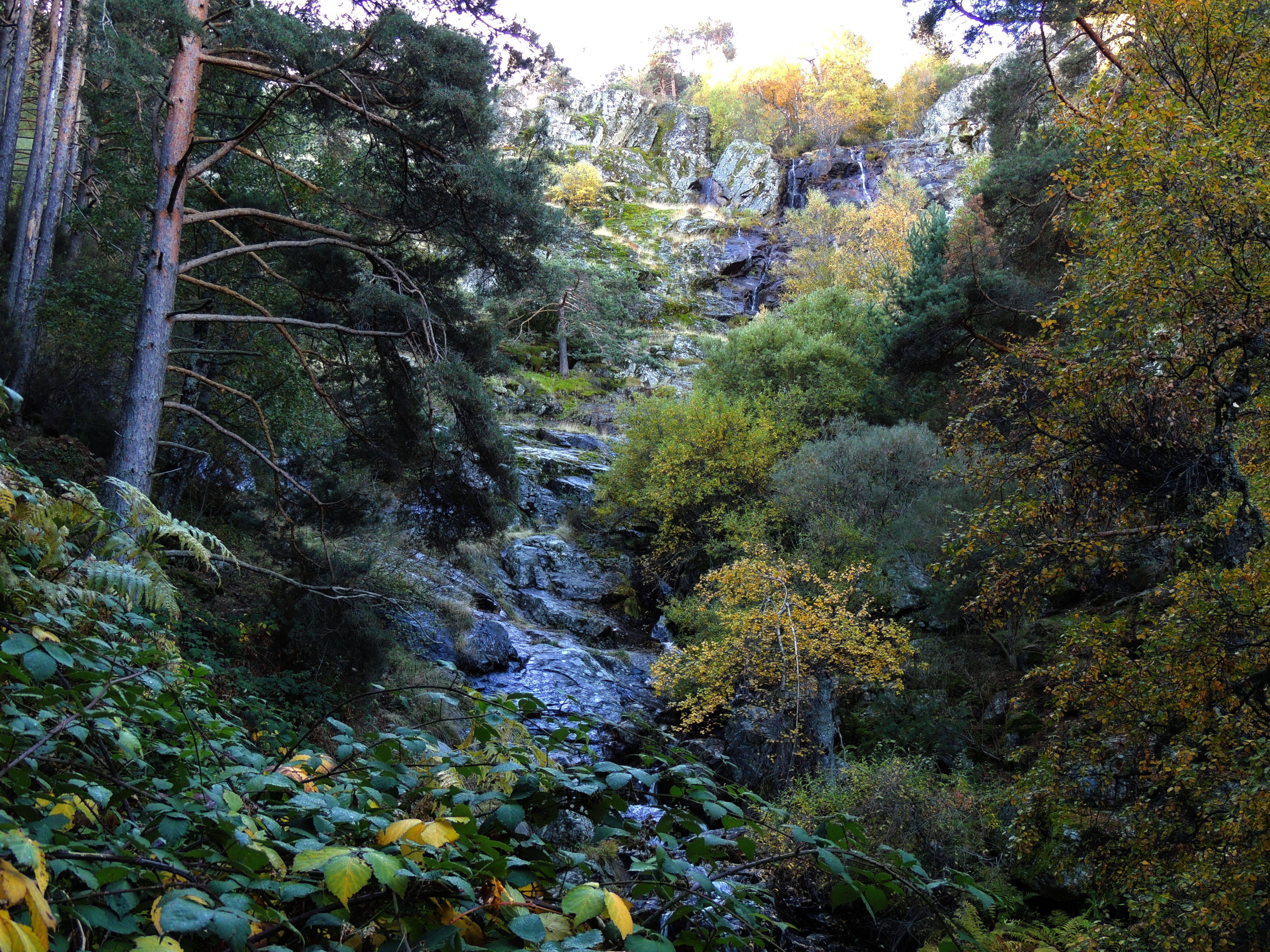 Chorrera de Mojonavalle (Abedular de Canencia)